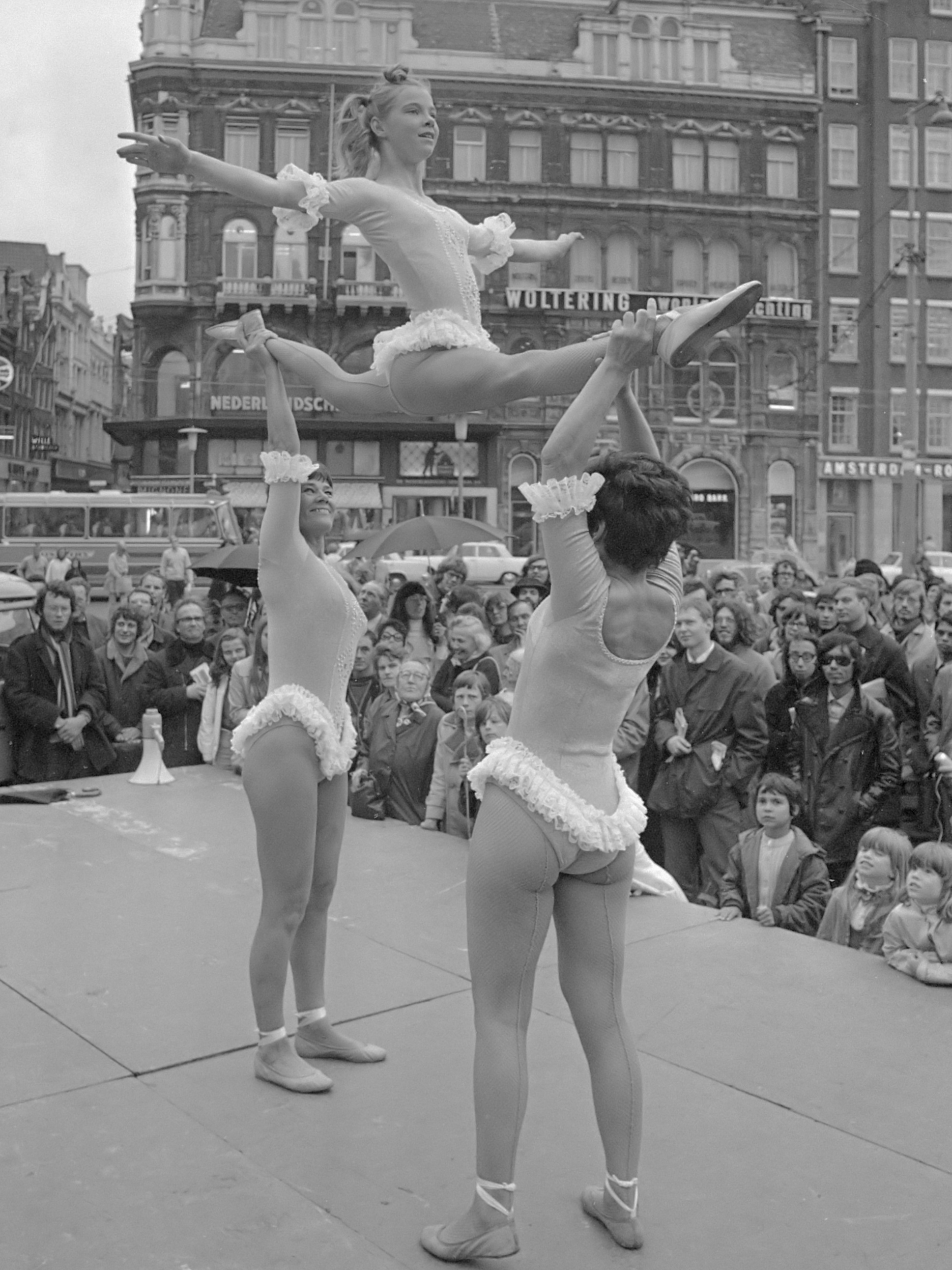 Acrobatengroep Osmanis 15 juni 1971